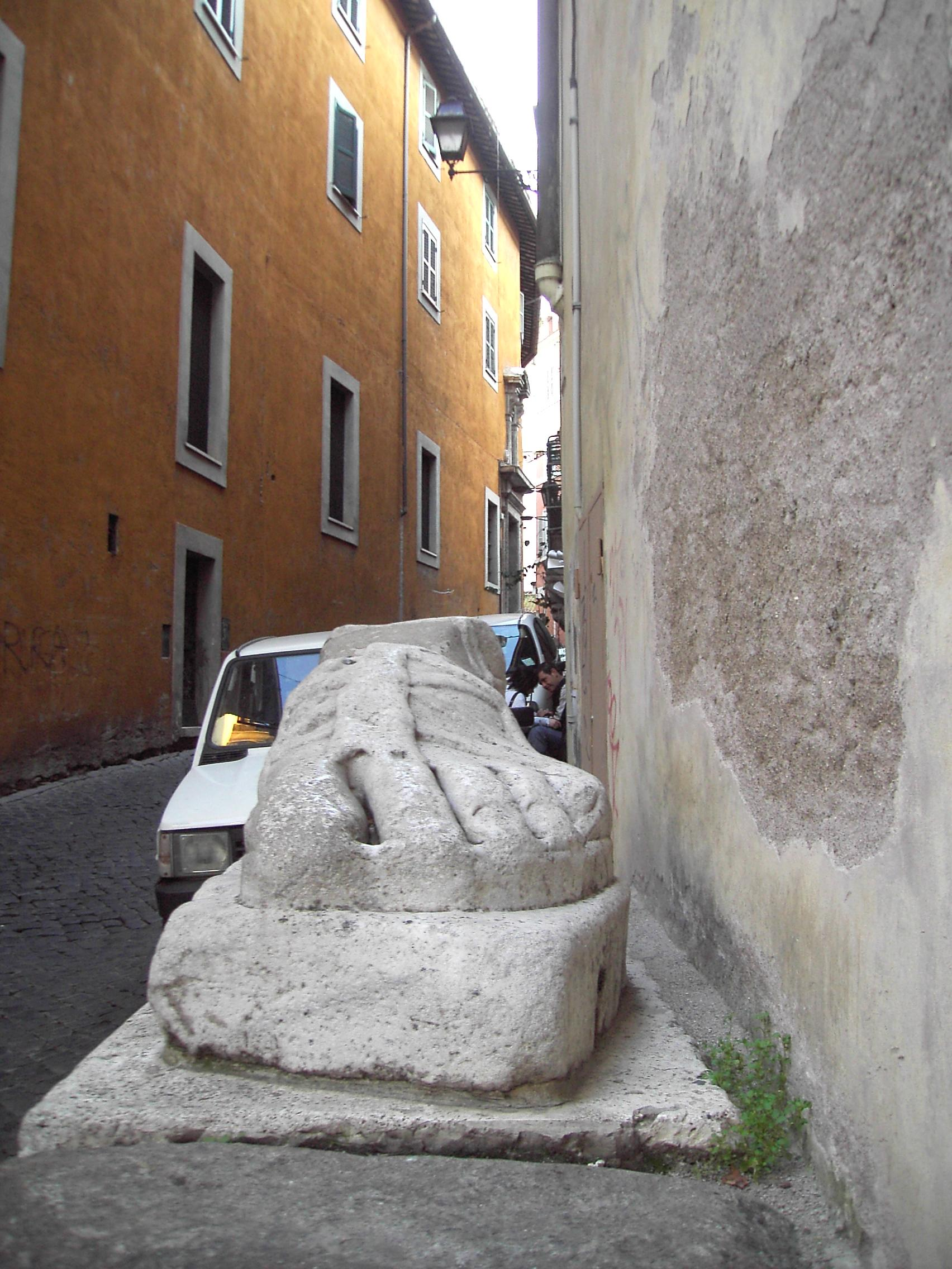 Roma, rione Pigna: il Pie' di marmo a via santo Stefano del Cacco, proveniente presumibilmente dal vicino Iseo Campense